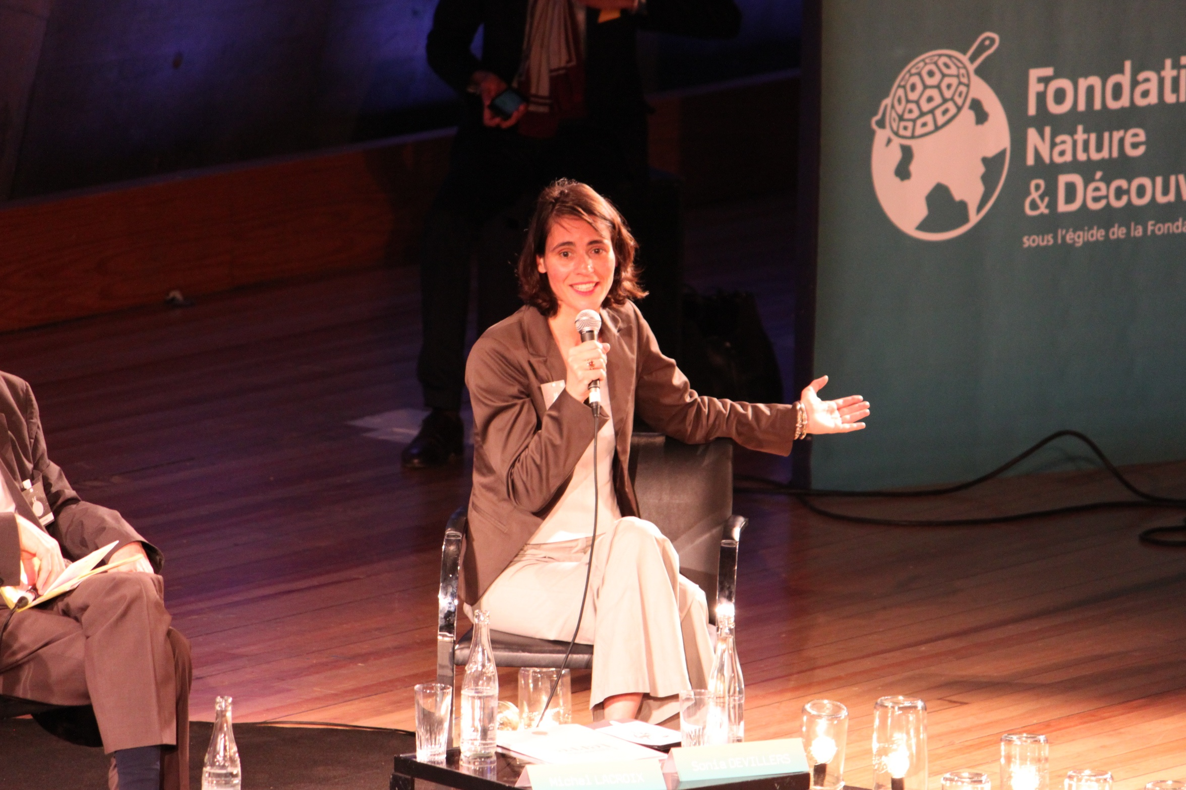 Sonia Devillers à l'Université de la Terre, Paris, 2 avril 2011.